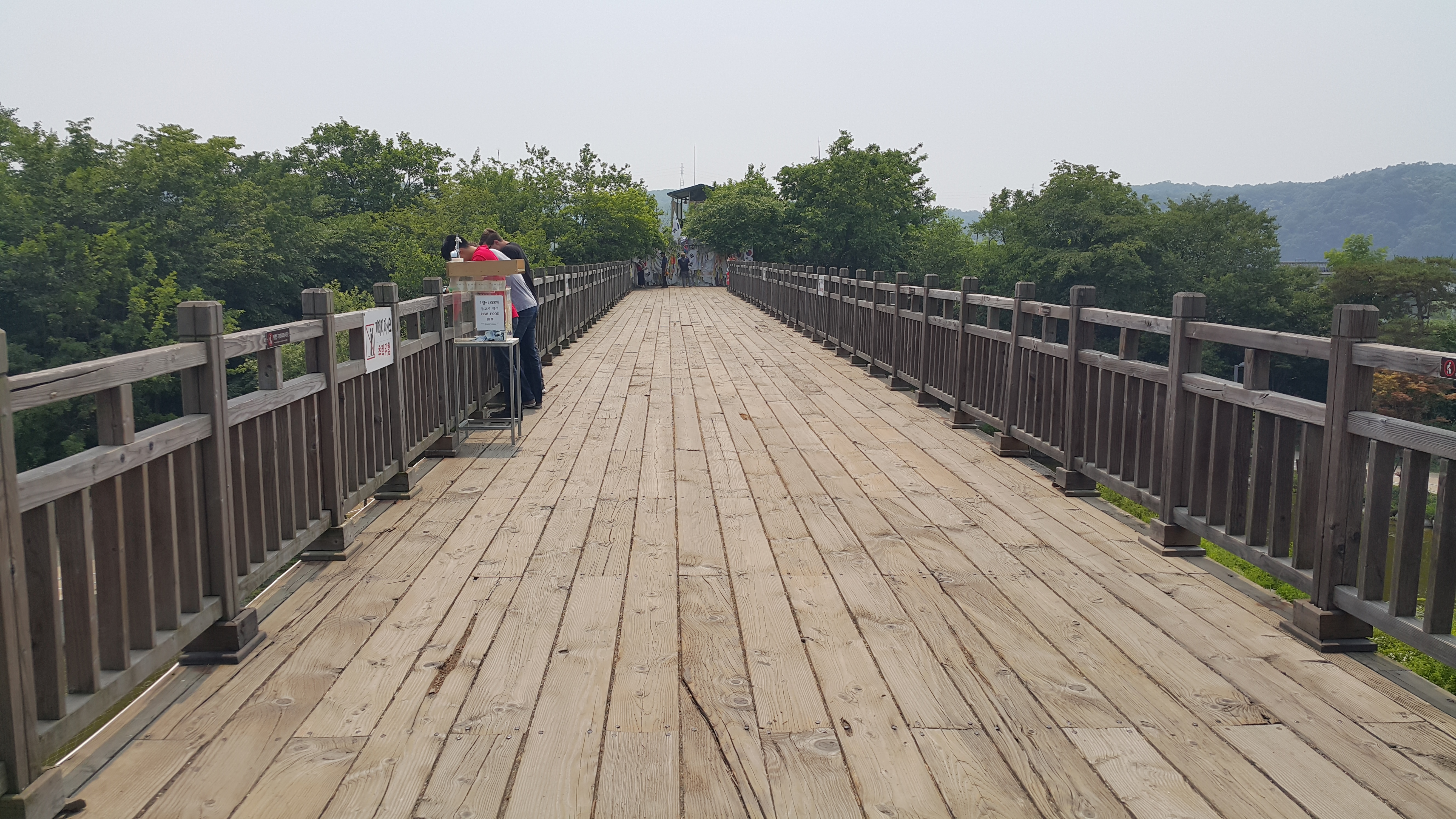 Cây cầu Tự do được chính quyền thành phố Paju khôi phục lại với mục đích du lịch tại Imjingak.